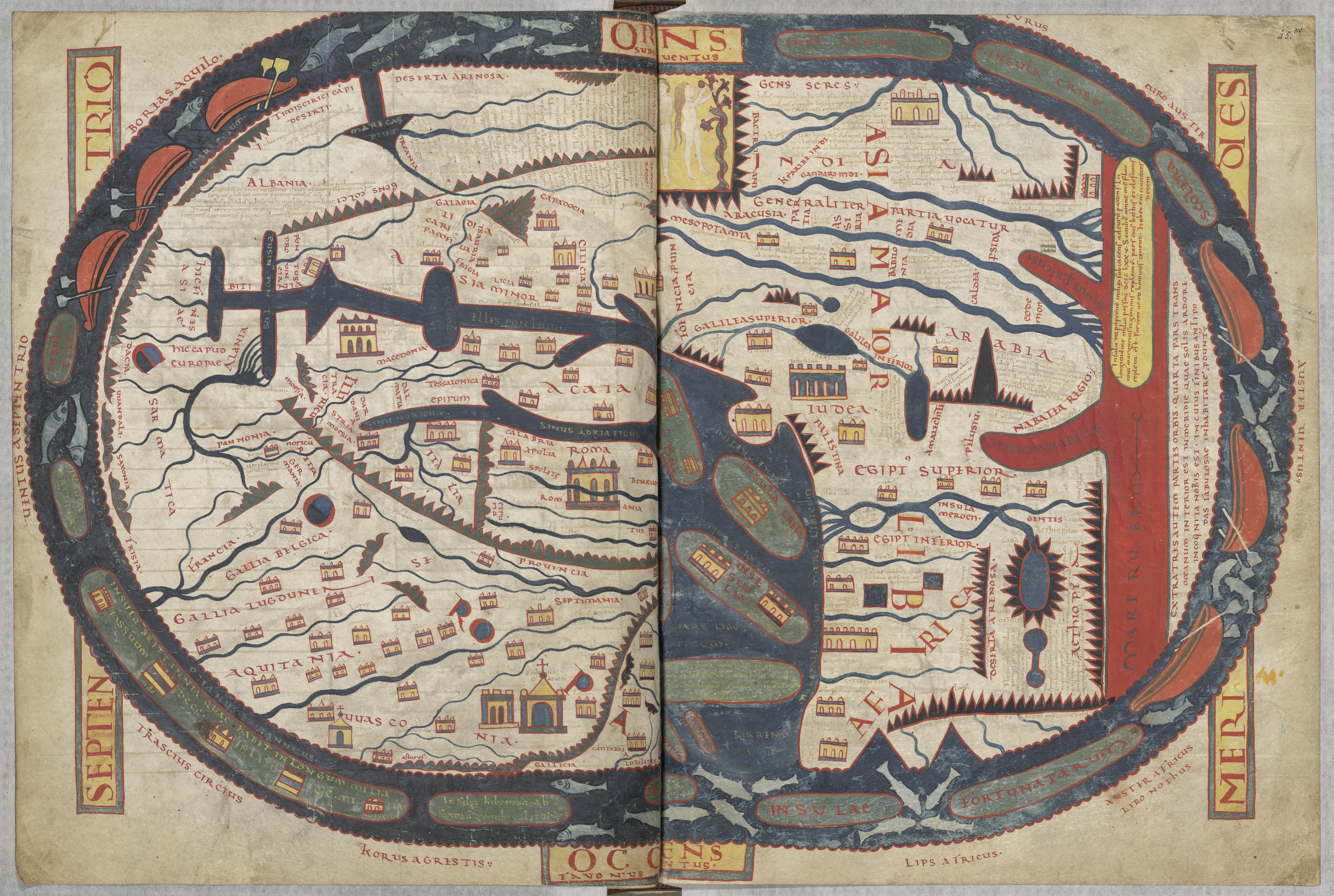 Mappemonde